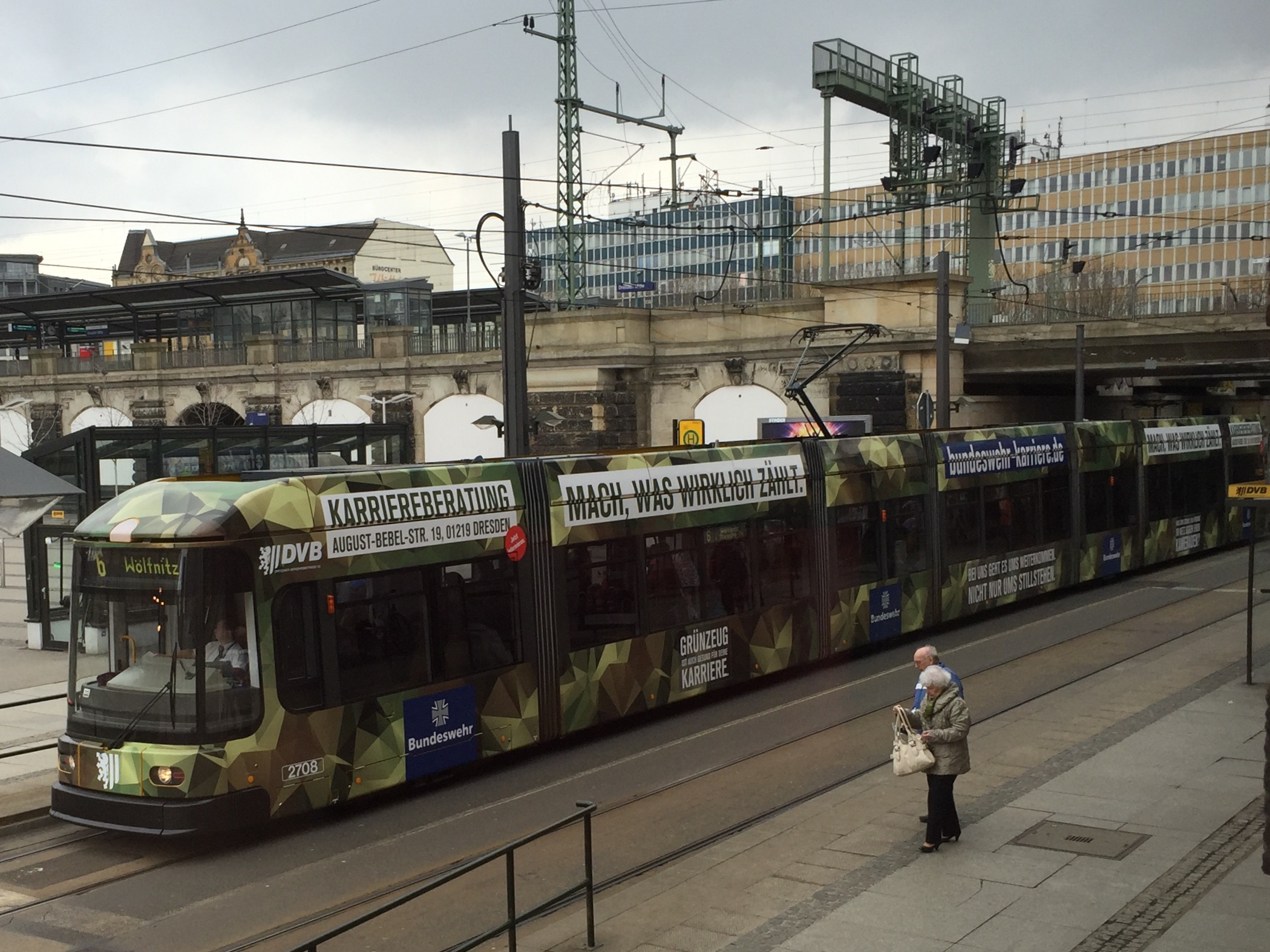 Straßenbahnwagen 2708, Dresden